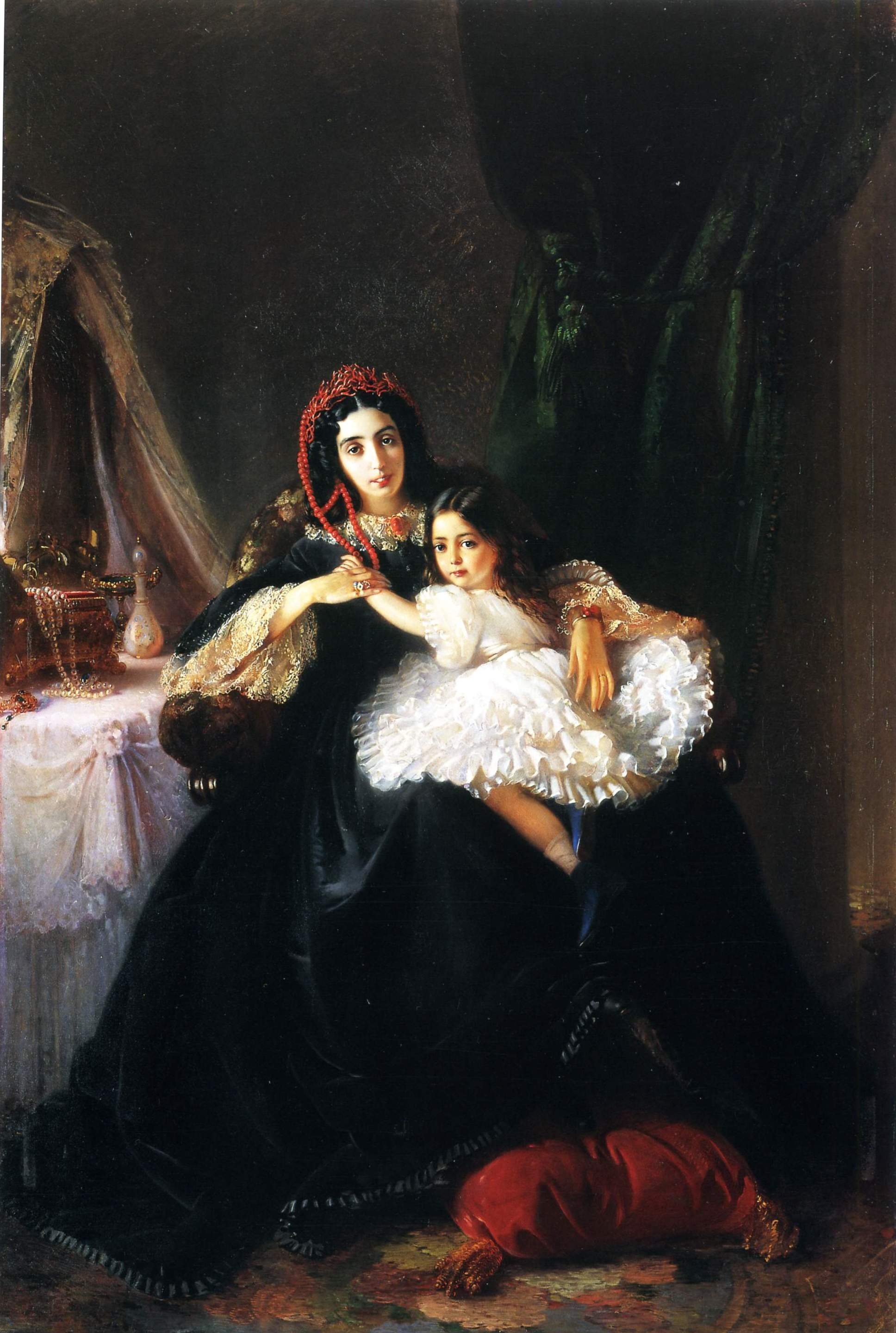 Графиня Анна Дмитриевна Ржевуская, ур. Дашкова (1831—1858) с дочерью. (Имя изображенной указано согласно списку работ художника в книге его сына «Портреты современников», был написан посмертно).